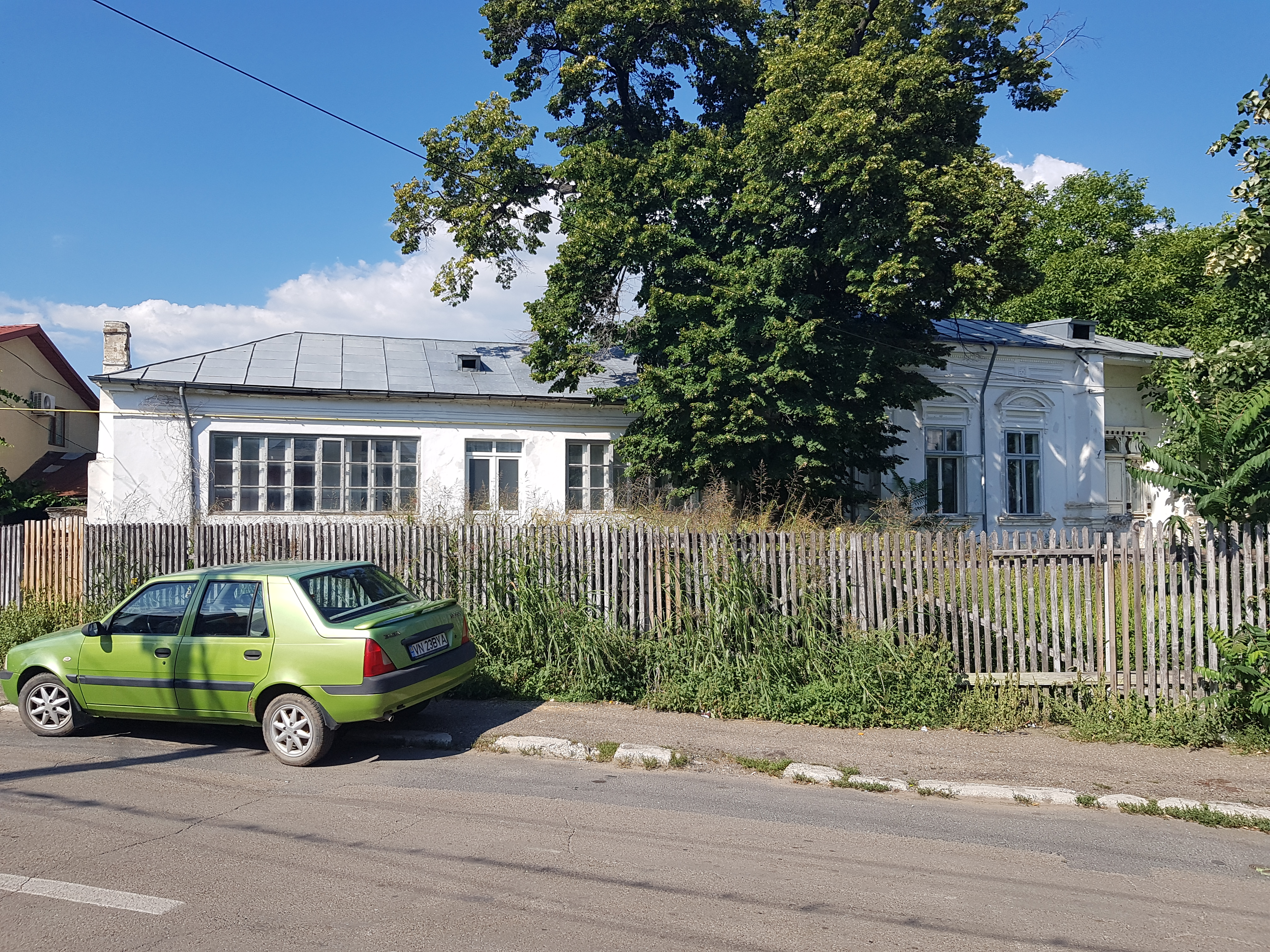 Casa Sclavone